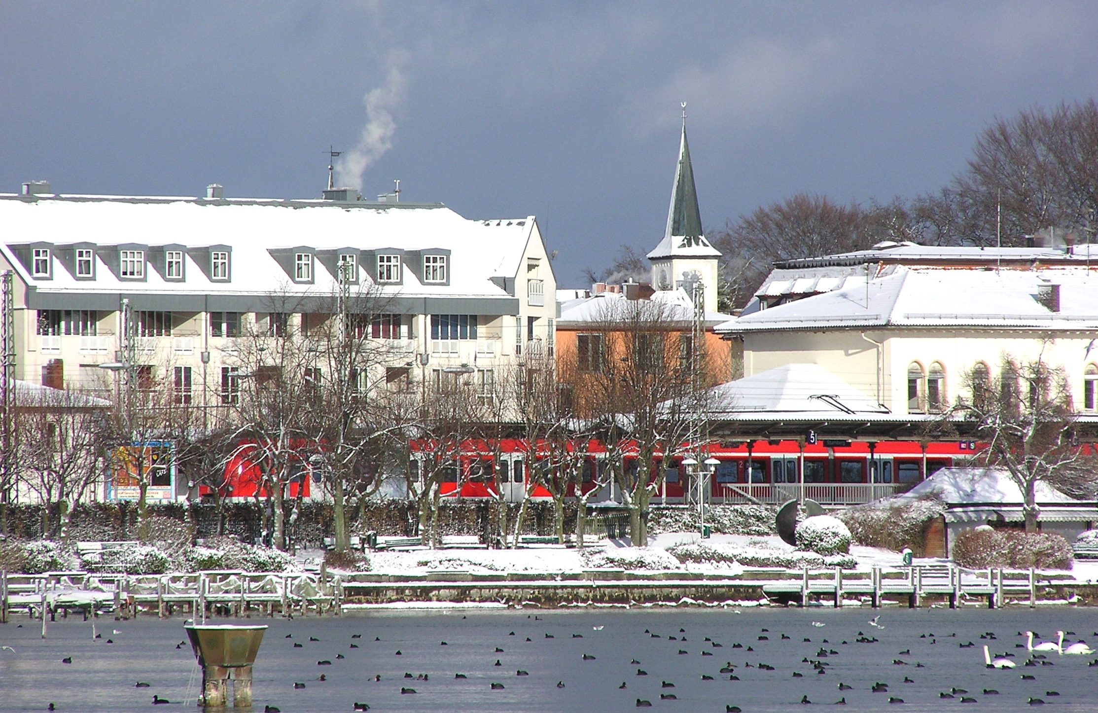 Starnberg. Blick vom See auf das Bahnhofsgelände.